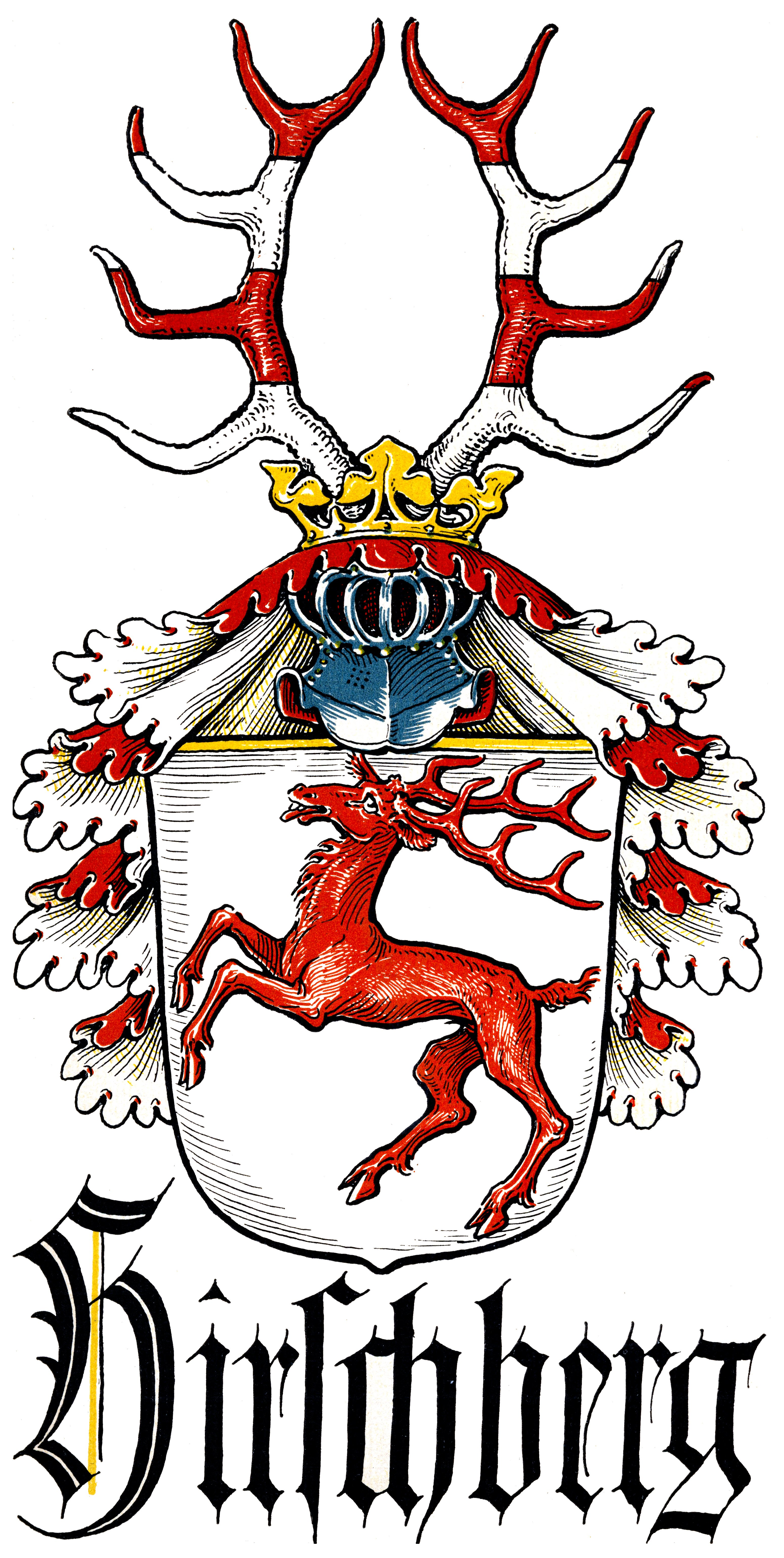 Wappen derer von Hirschberg